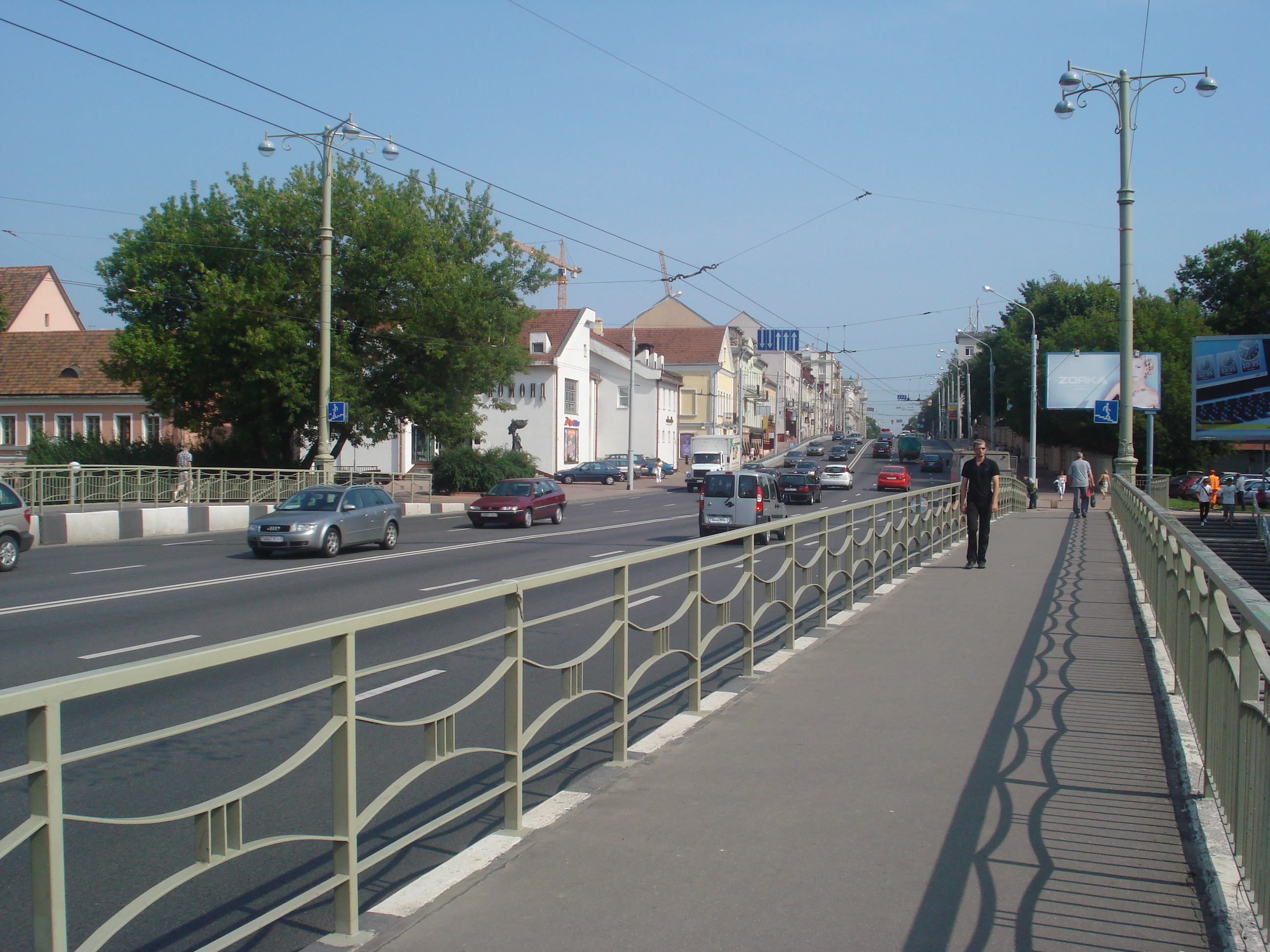 Минск.Мост через реку Свислочь.